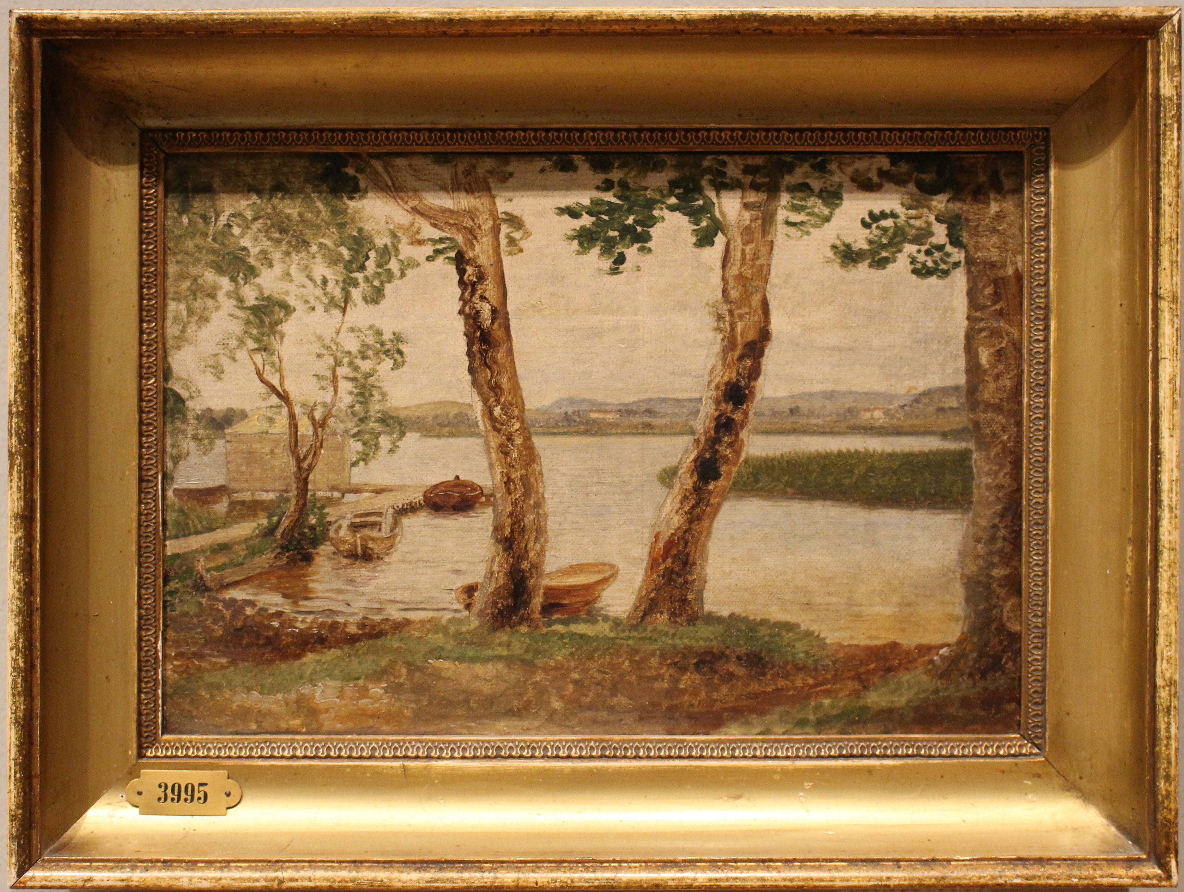 C.W. Eckersberg. 1783-1853. Dansk. Parti ved Lyngby Sø. Ca. 1827. Olie på lærred. Erhvervet 1932. KMS3995.